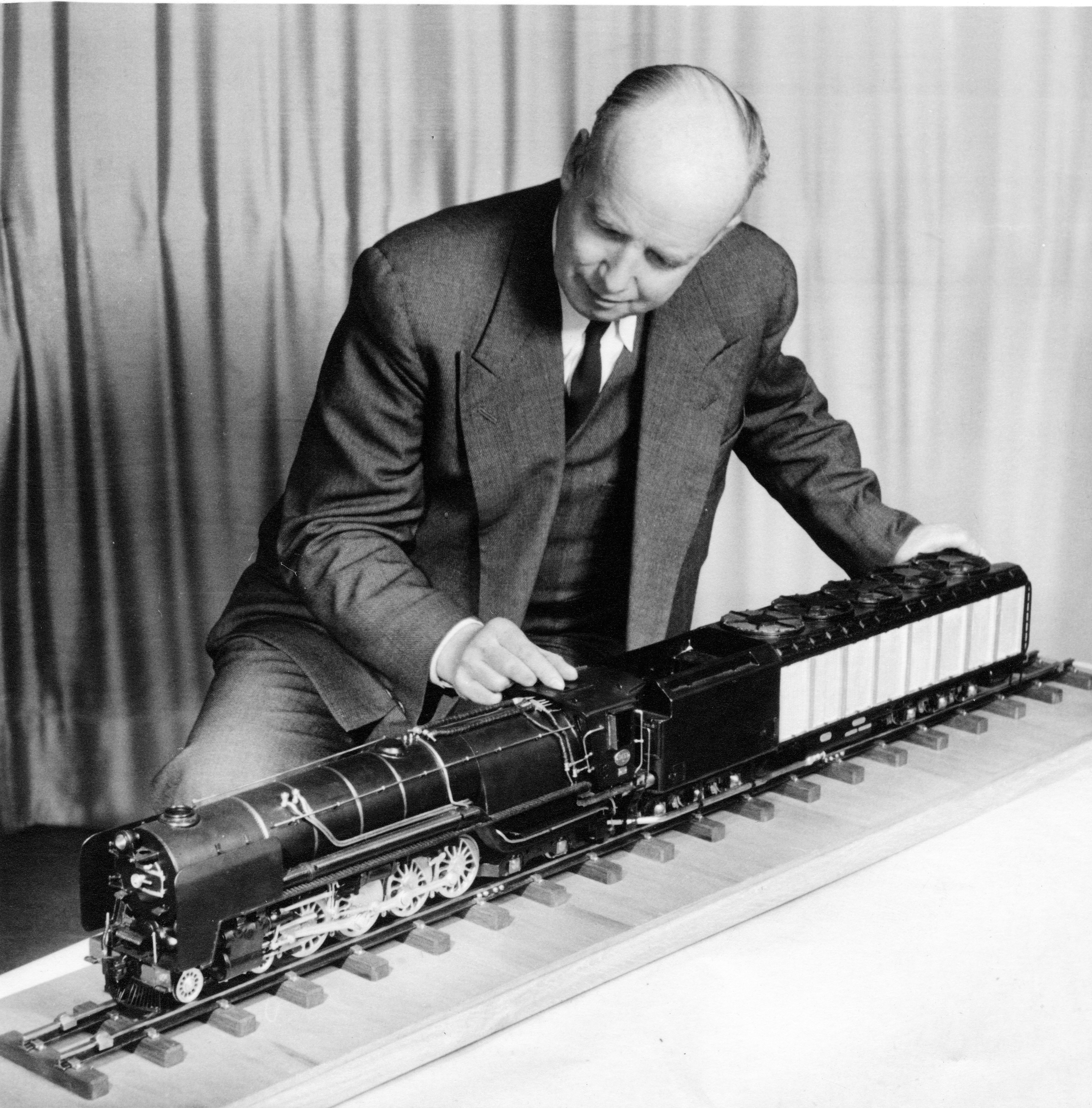 Richard Roosen mit dem Modell einer Kondenslokomotive für Südafrika